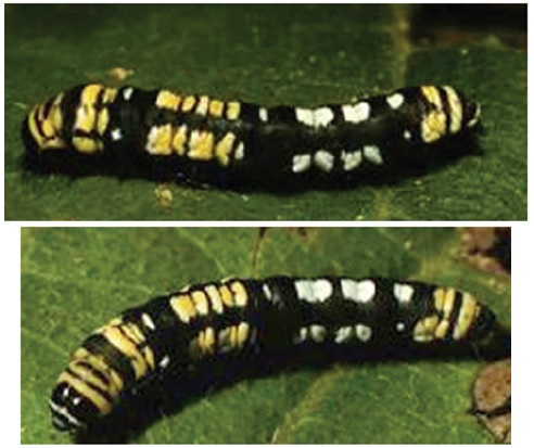 Ethmia mnesicosma